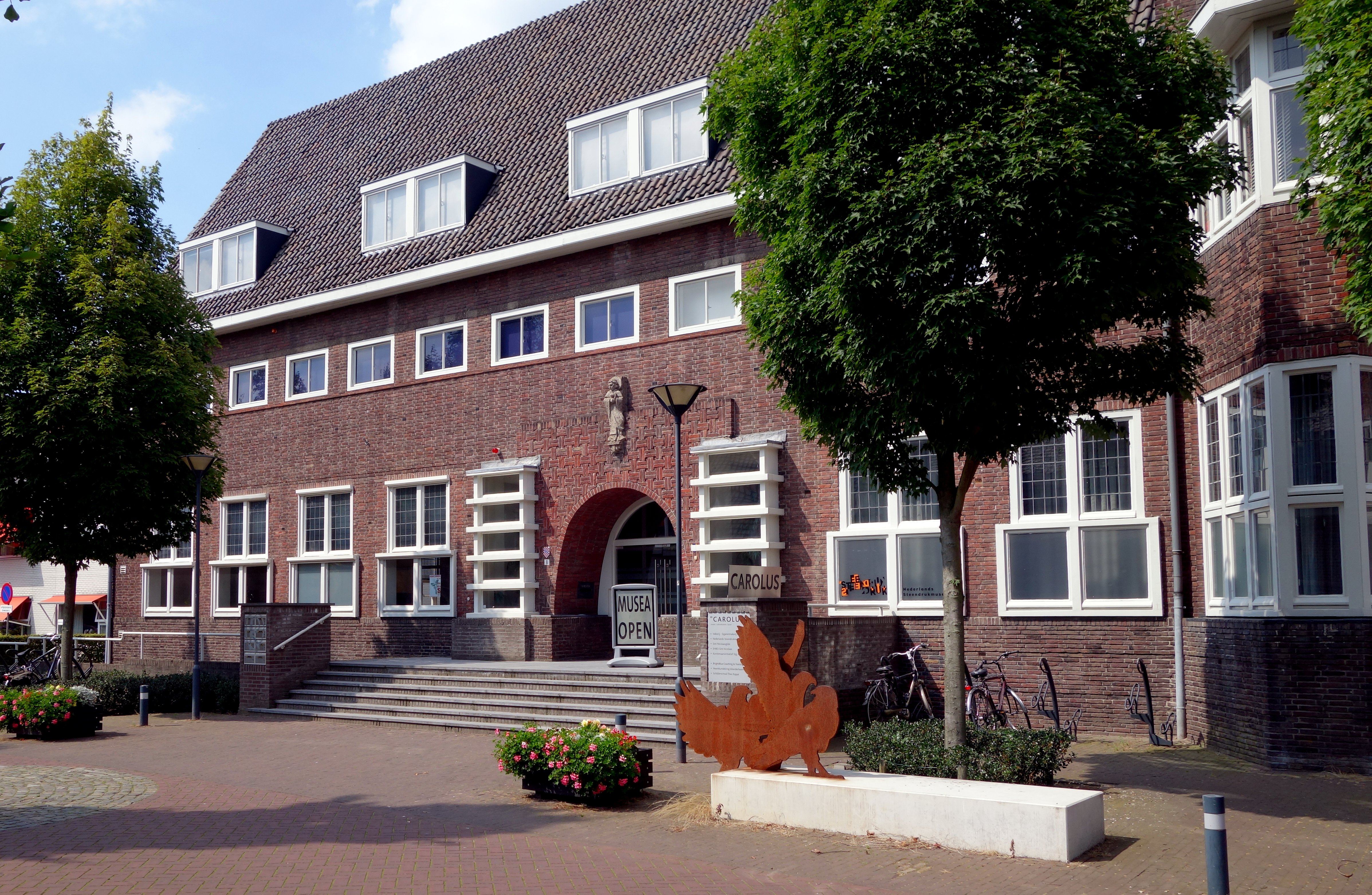 Het museum is gevestigd in het in 1929 geopende CAROLUS gebouw in Valkenswaard.